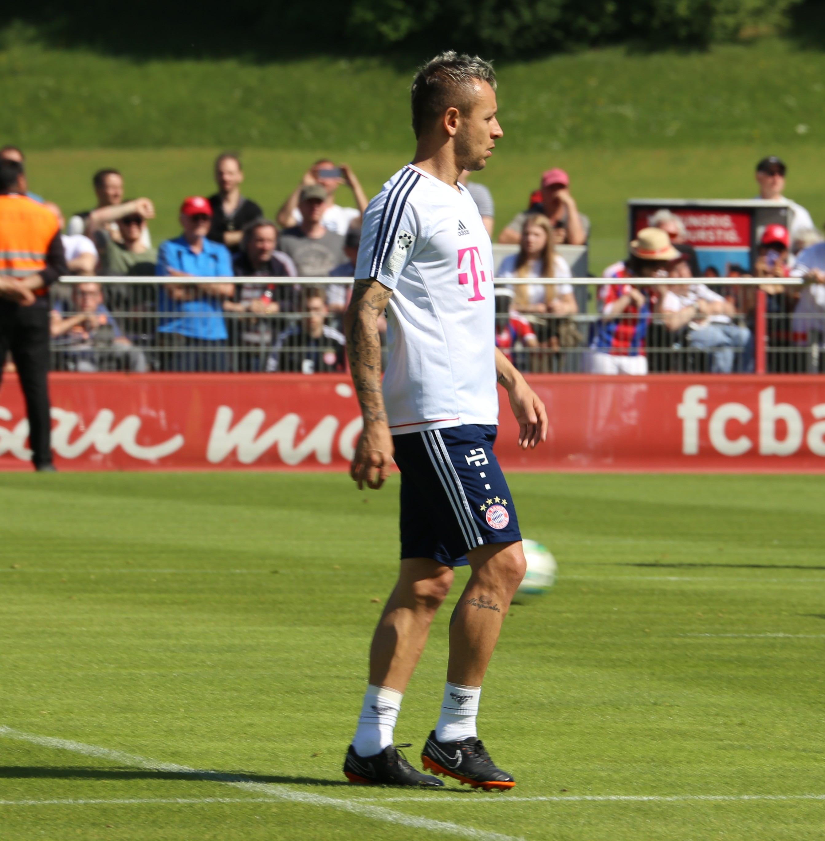 Rafinha, am 8. Mai 2018 beim Training auf dem Gelände des FC Bayern München